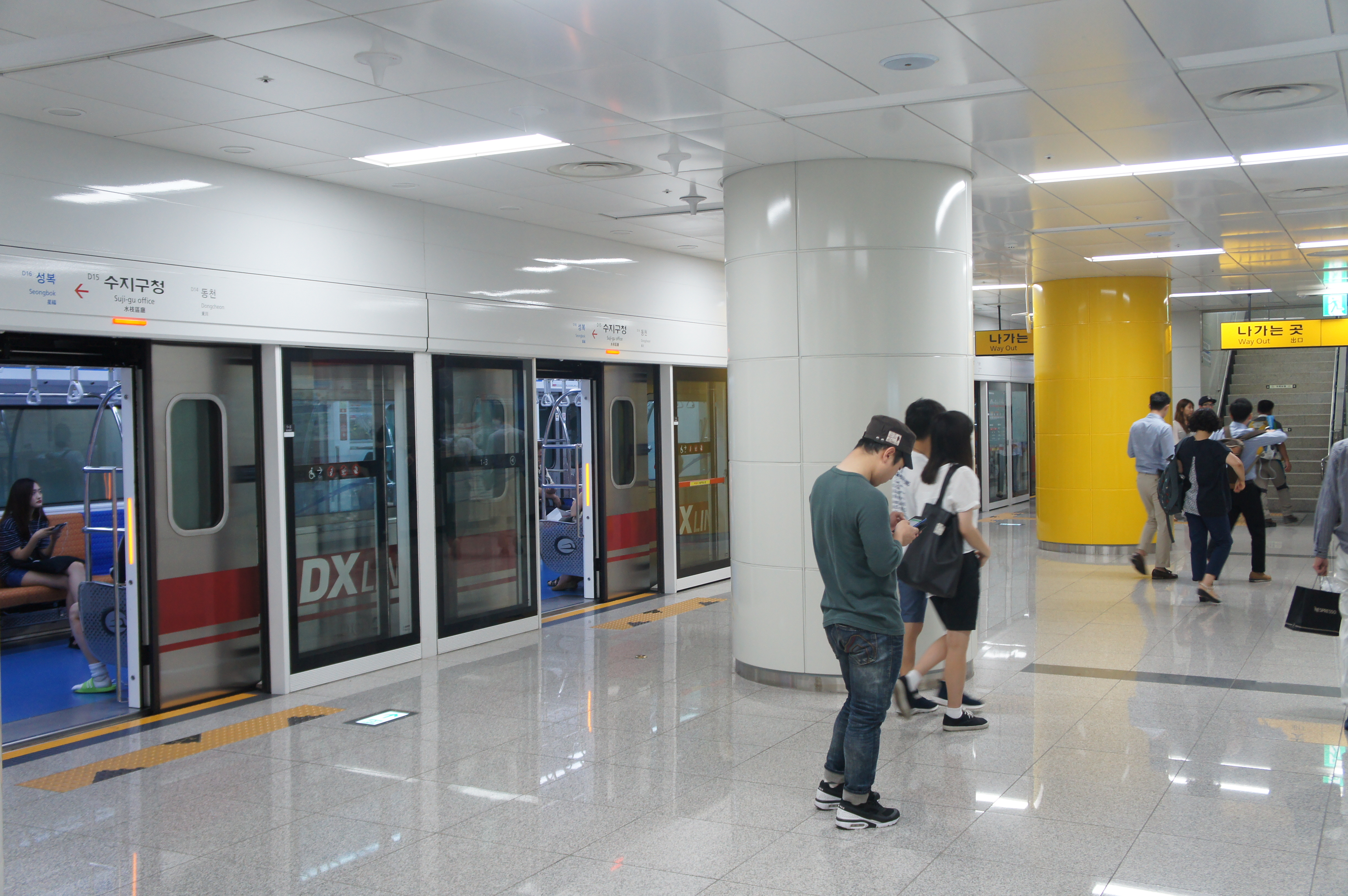 수지구청역 승강장